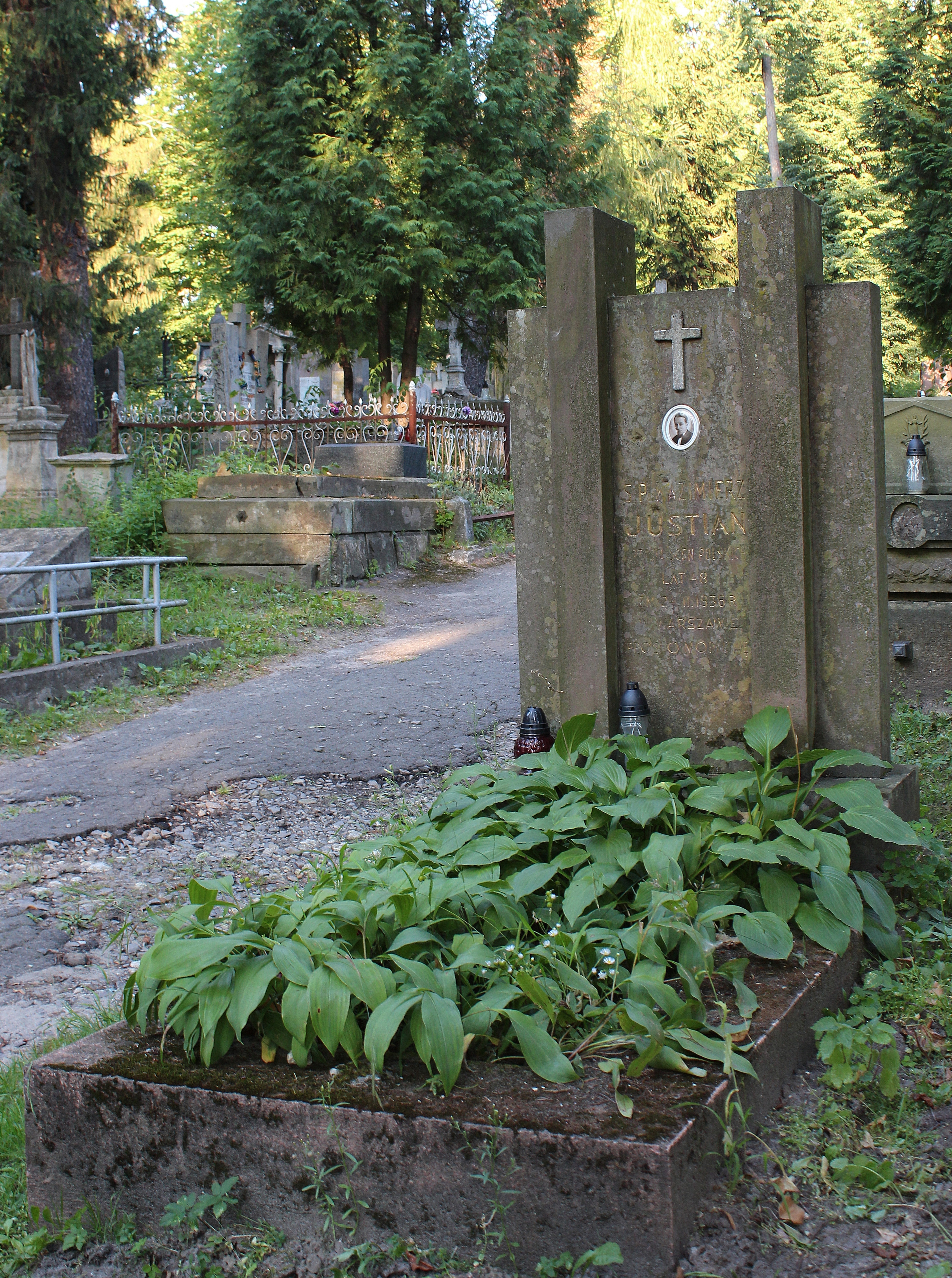 Надгробок на могилі актора К Юстяна.Личаківський цвинтар , поле № 14.